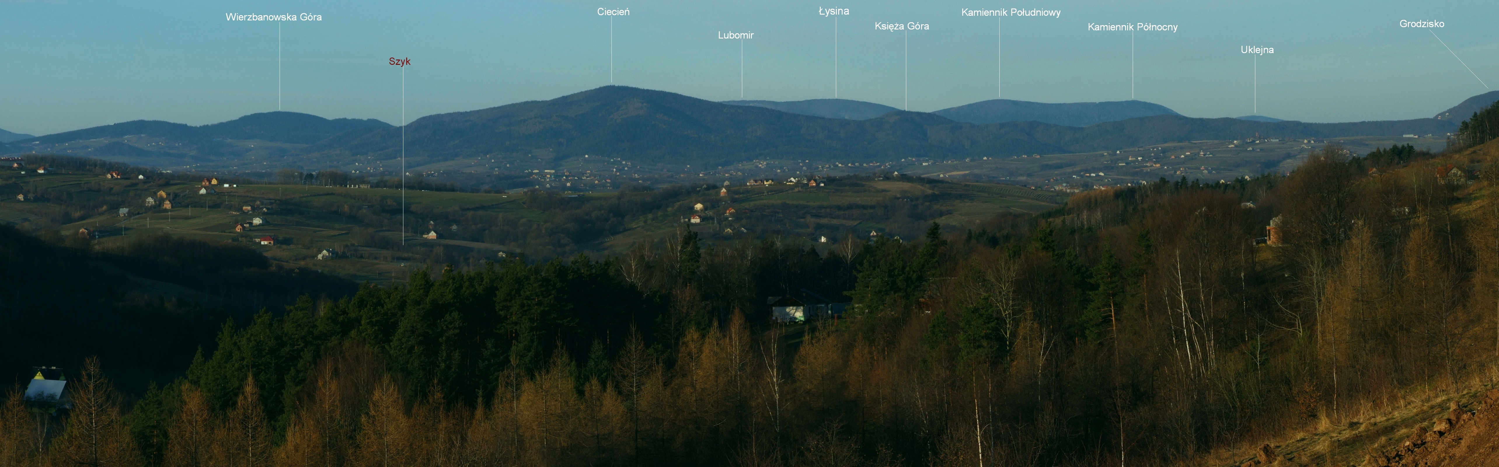 Panorama z Rybia Starego na zachodnią stronę